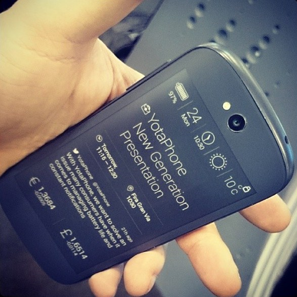 YOTAPHONE II. Задний экран сенсорный, но пока с другим интерфейсом. Это что -то вроде мокапа